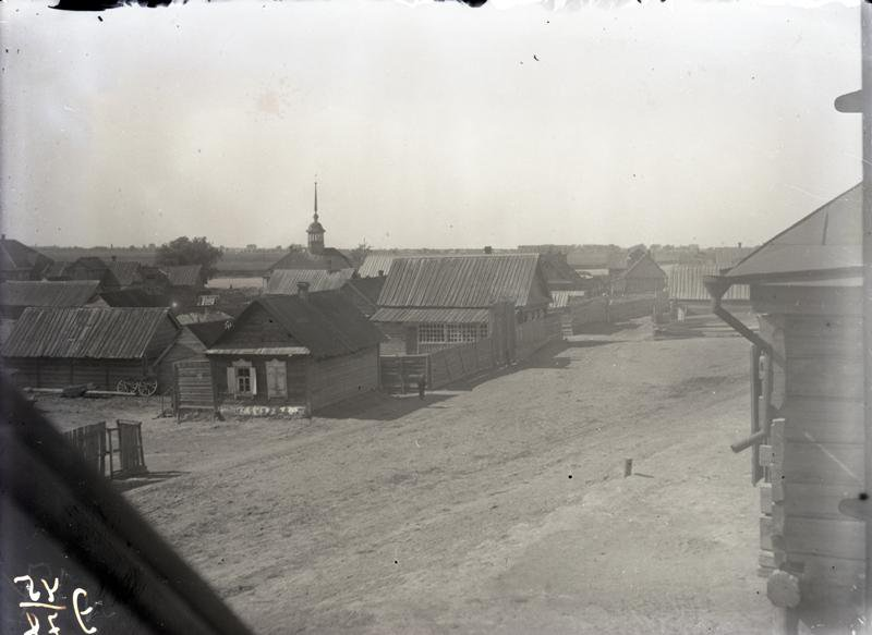 Общий вид села. с. Каргали (ногайцы). Сентрябрь-октябрь 1930 года. Фотография хранится в Саратовском областном музее краеведения и опубликована в Государственном каталоге Музейного фонда РФ.